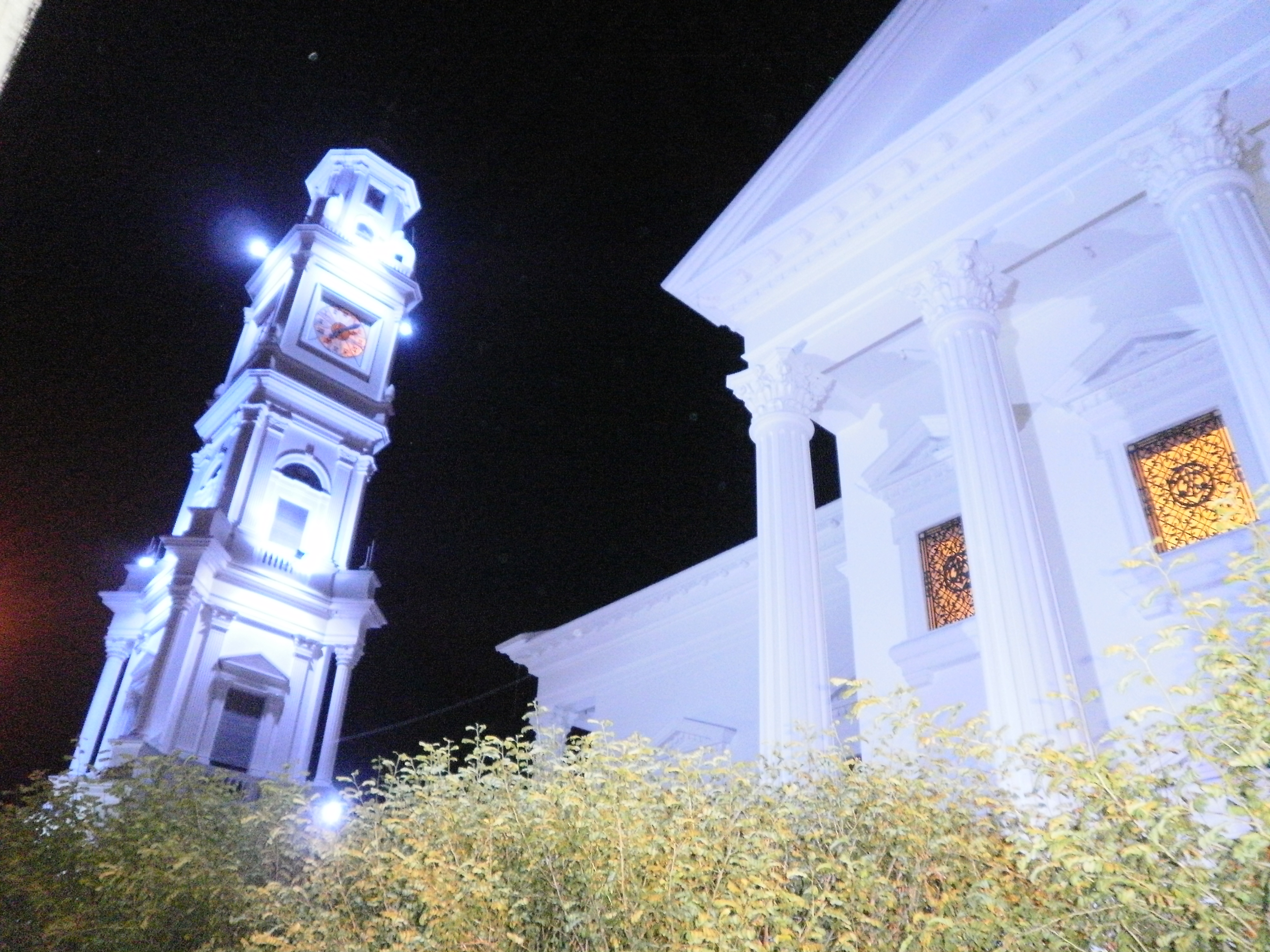 Catedral de Cartago